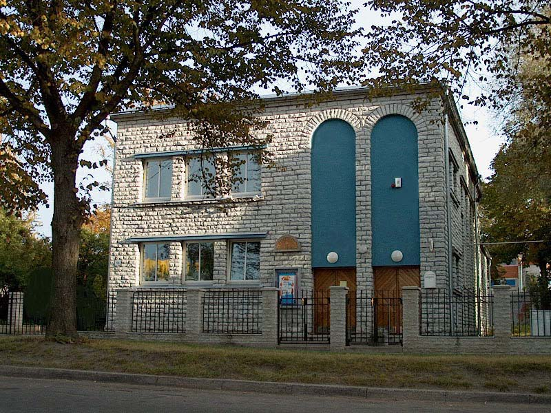 Tallinna Pelgulinna Rahvamaja, Telliskivi 56 (valmis u. 1931. a. palvelahoonena)